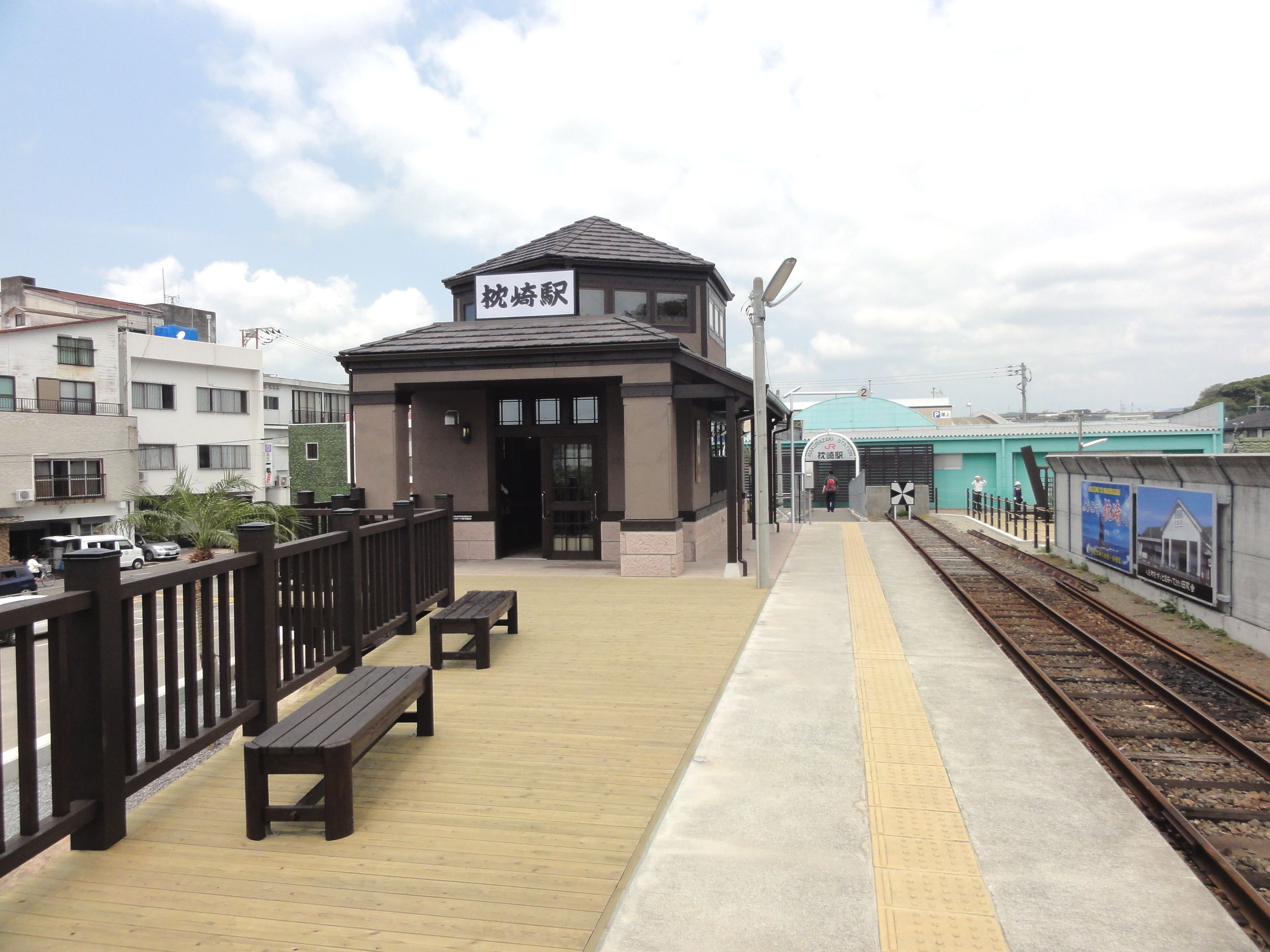 枕崎駅 駅舎とホーム（終点側）